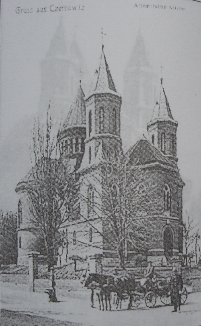 Поштівка з зображенням Вірменської церкви кінця 19-го століття